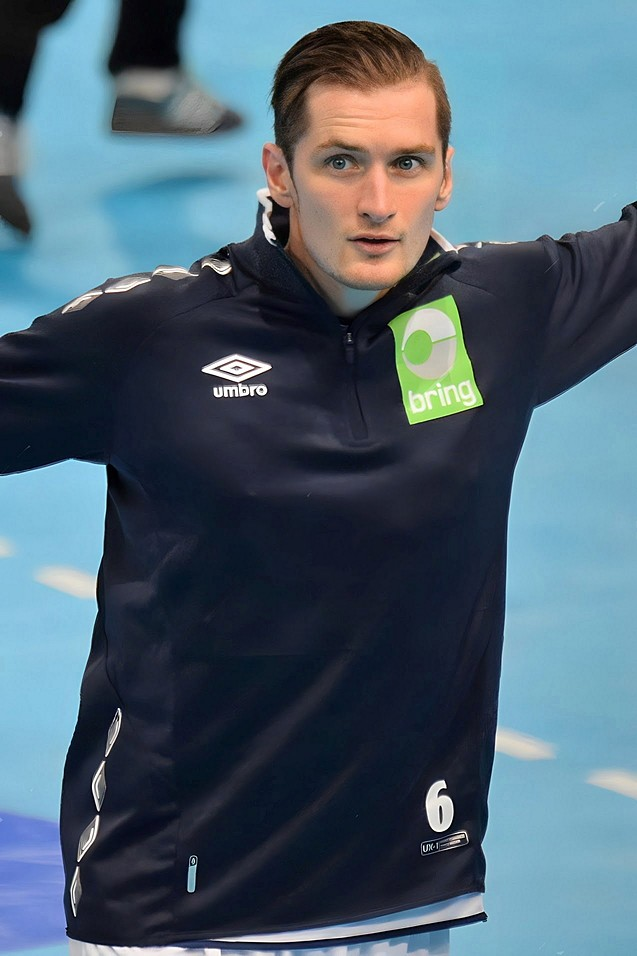 Le 10 janvier 2016 lors du match Norvège / Qatar durant la Golden League à l'AccordHotel Arena (Paris). Thomas Kristensen